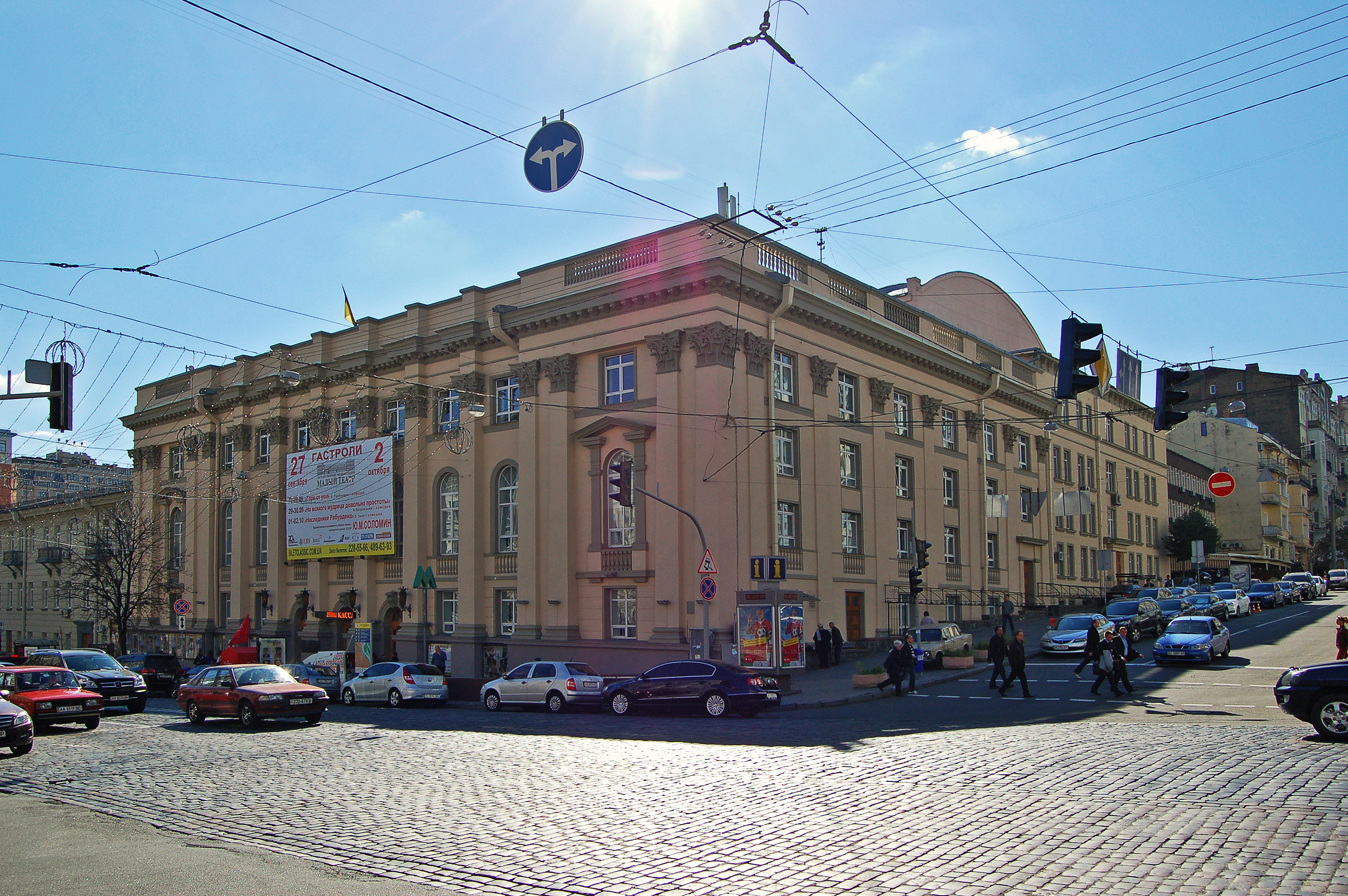 Дом № 5 (5/15) по улице Богдана Хмельницкого в Киеве